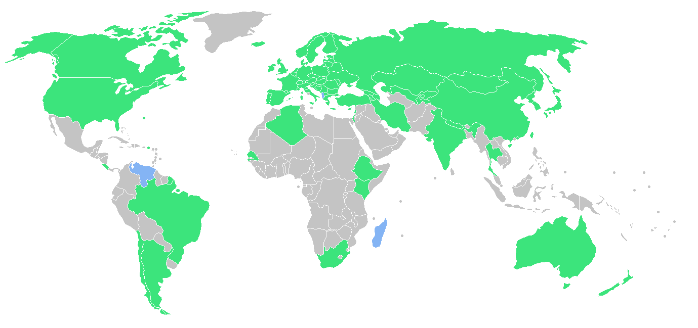 Carte des pays participants aux Jeux olympiques d'hiver de 2006. En vert, les pays participants, en bleu, les pays participant pour la première fois.